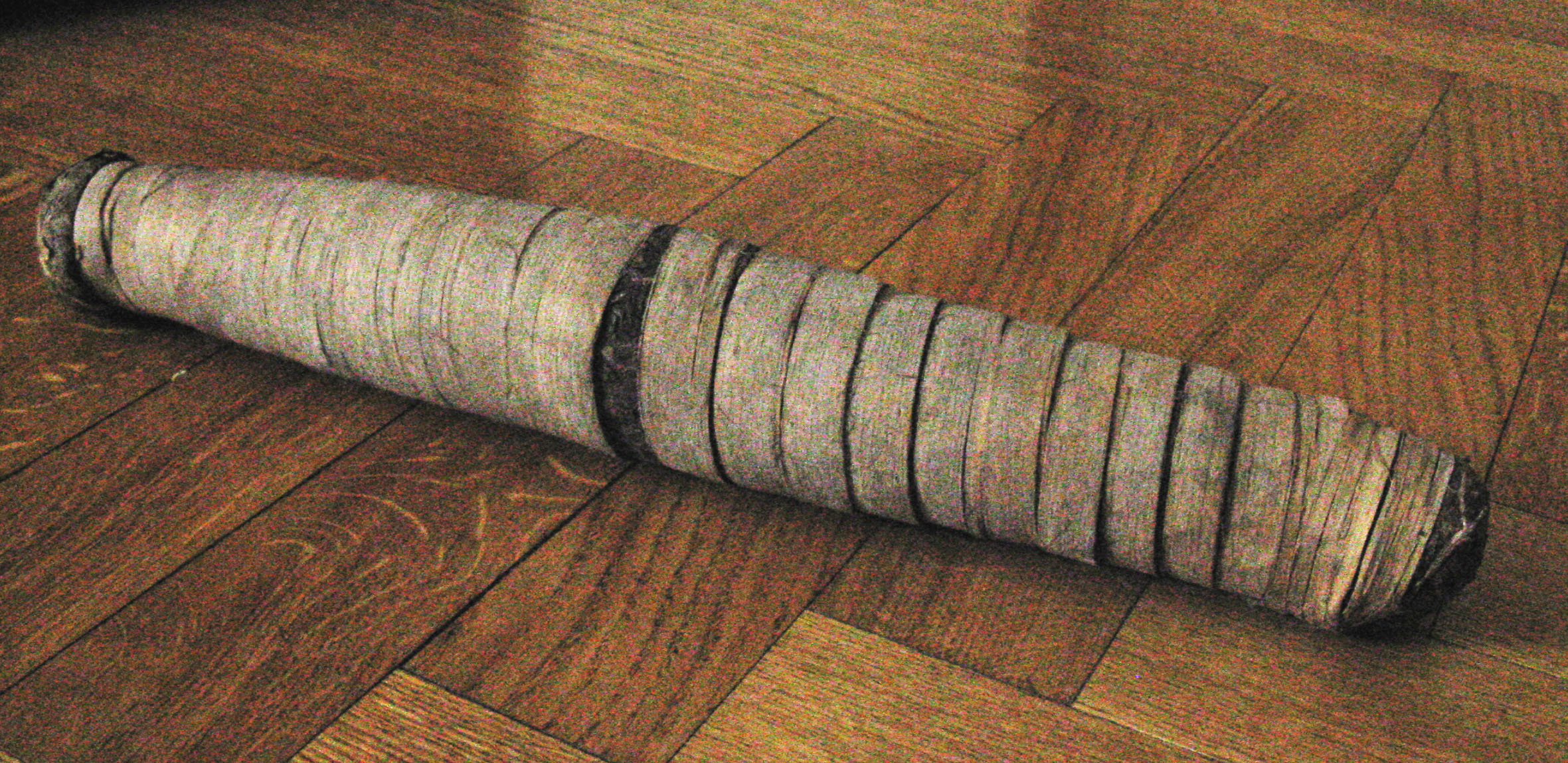 Ролл мапачо - Макатос. Куплен в Перу, Икитос, Белен.